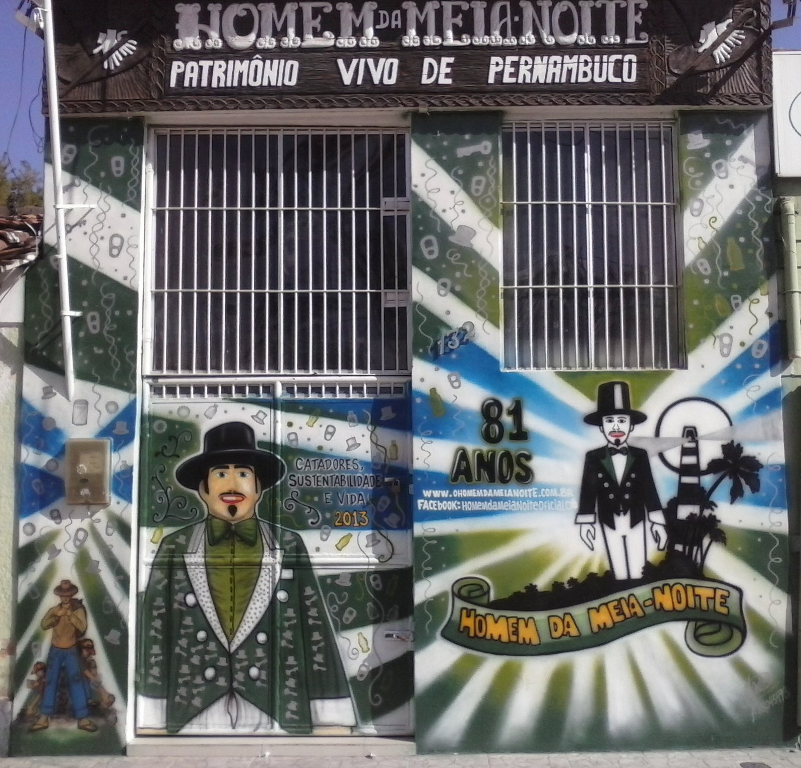 Sede d'O Homem da Meia-Noite